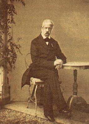 Leopold II van Toscane (1797-1870)